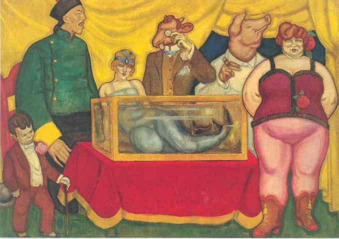 David-Ossipovitch Widhopff, "Les Phénomènes", 1924, peinture sur toile, 214 x 302 cm (Inv. P 487) . Musée municipal de l'Evéché, Limoges